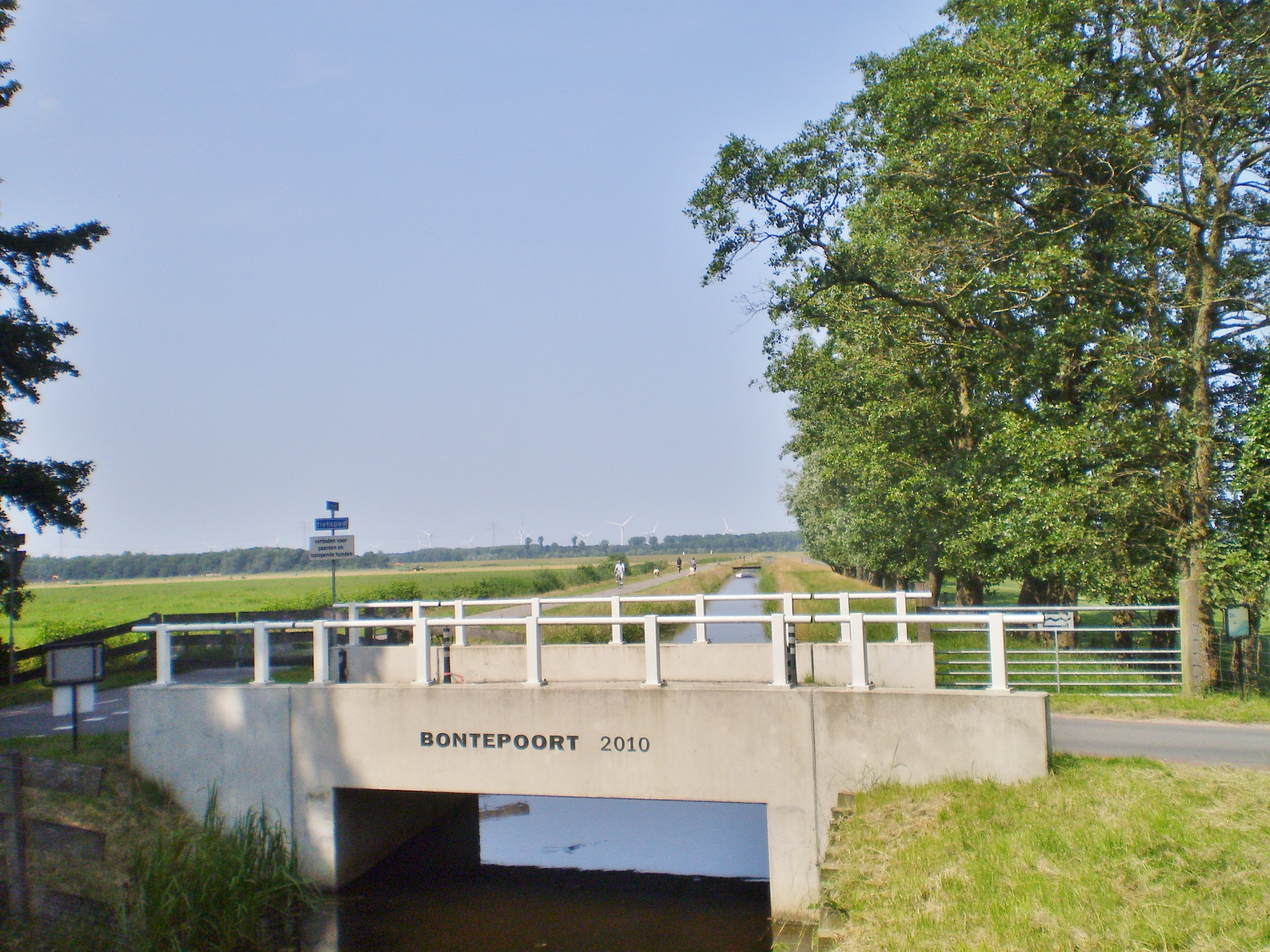 zicht richting Nijkerkernauw. Op de achtergrond de windmolens in Flevoland